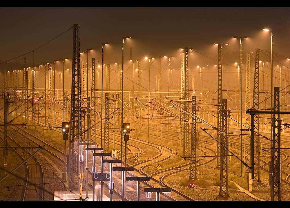 Zugbereitstellungsnalage Hannover-Nordstadt